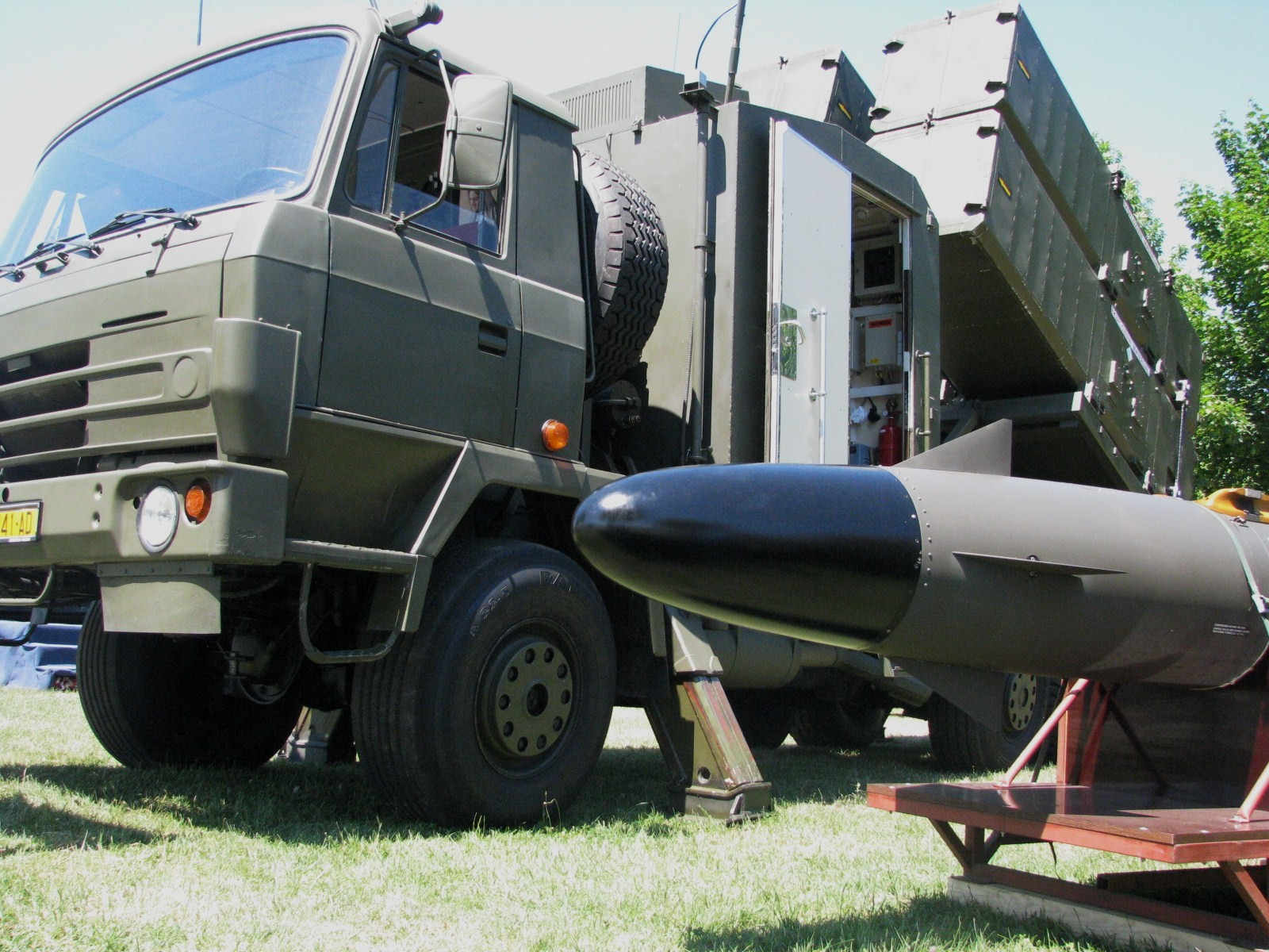 Mobilni obalni lanser (MOL) i raketa RBS-15